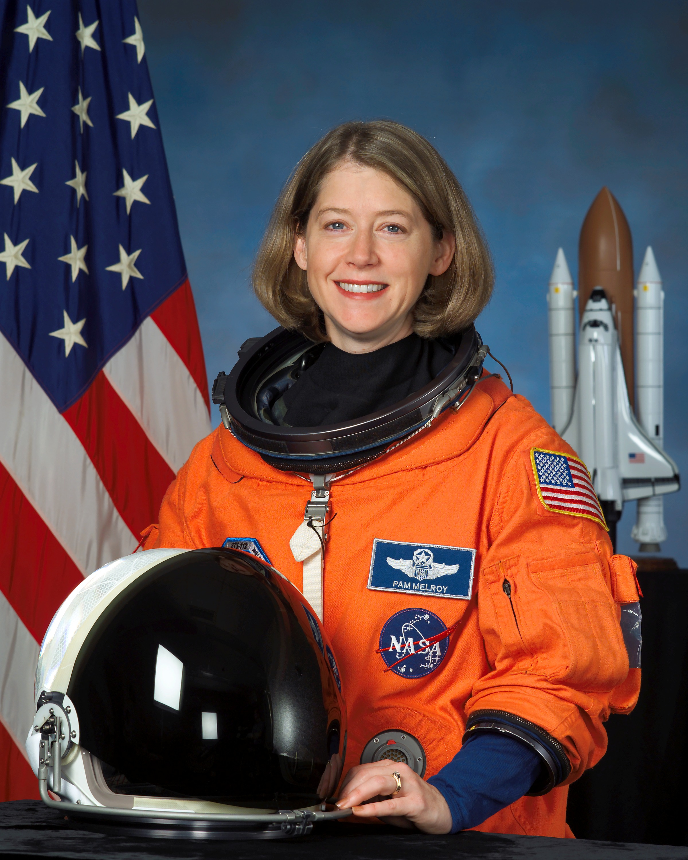 portrait astronaut Pamela Melroy